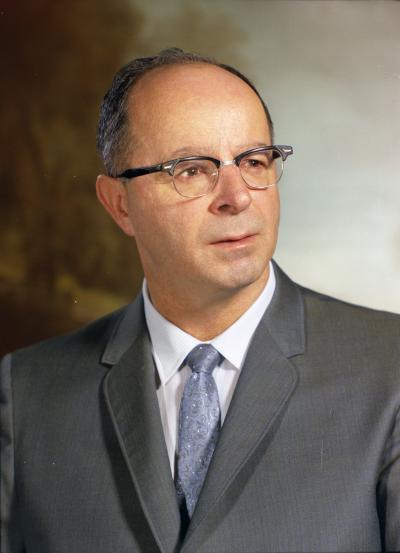 Senator Reuben A. Knoblauch, 1967